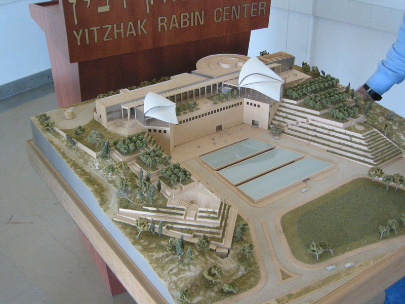 Yitzhak Rabin Center, Tel Aviv